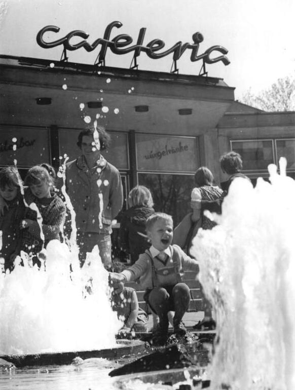 Berlin, Tierpark, Café, Springbrunnen Zentralbild Mittelstädt 17-5-70 Berlin: Pfingsten in der DDR-Hauptstadt- Zu den Anziehungspunkten der Berliner und vieler ausländischer Touristen gehört zweifellos der Tierpark in Friedrichfelde. Bei wunderschönem Wetter lässt es sich an den Wasserspielen vor der "Cafeteria" wie man siehr recht fröhlich verweilen.